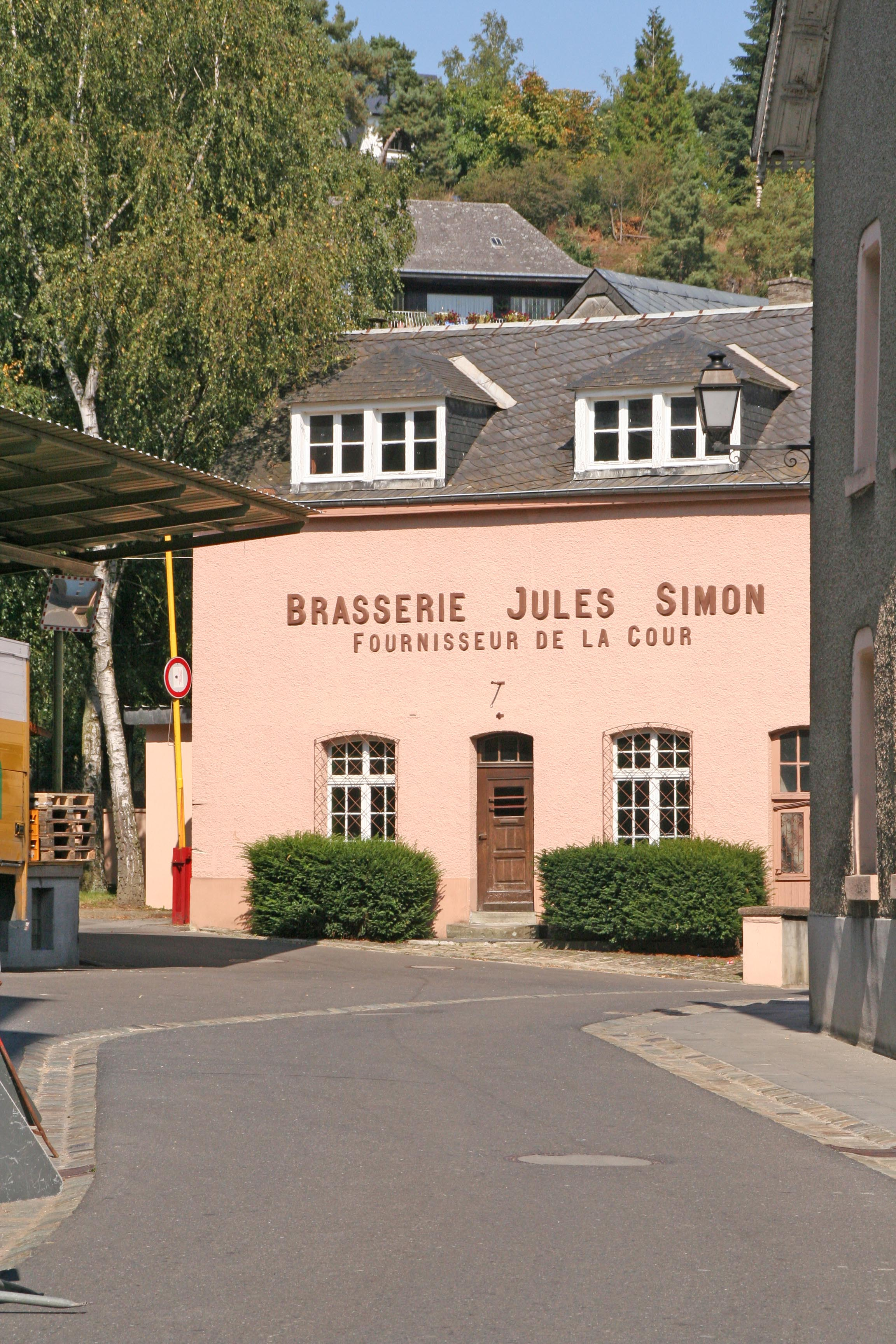 Ee Gebai vun der Brauerei Simon Source: Eege Foto vum Cornischong Lizenz